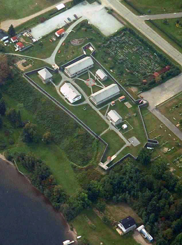 Vue aérienne du Fort Ingall au bord du lac Témiscouata, à Cabano, Québec, Canada.